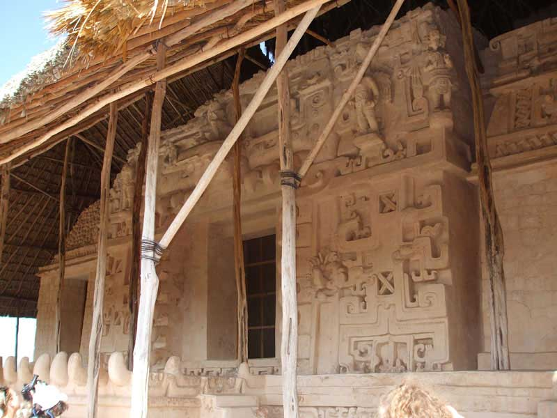 Ek-Balam